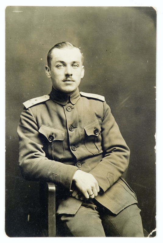 Paul Laamann